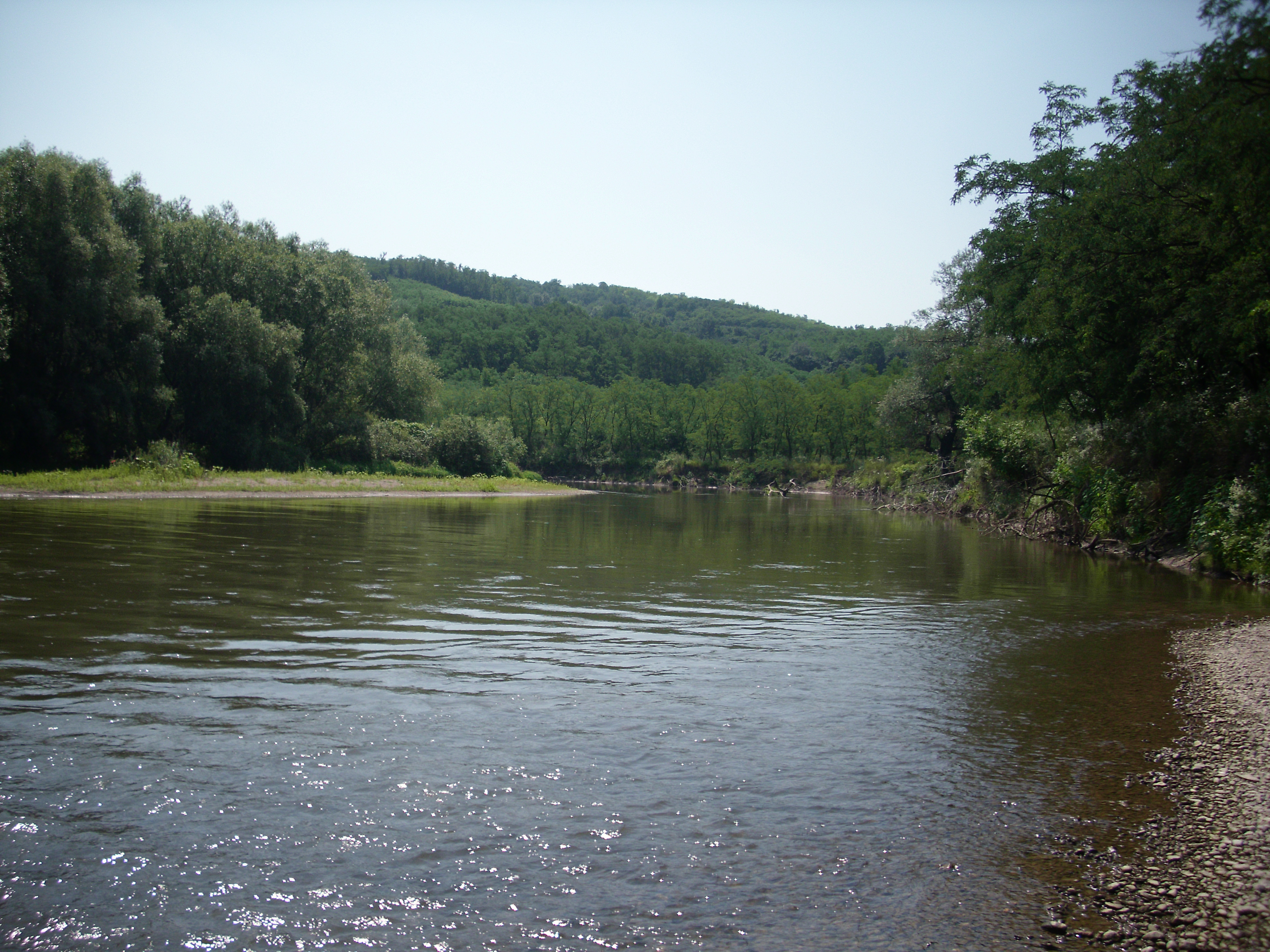 Hernád